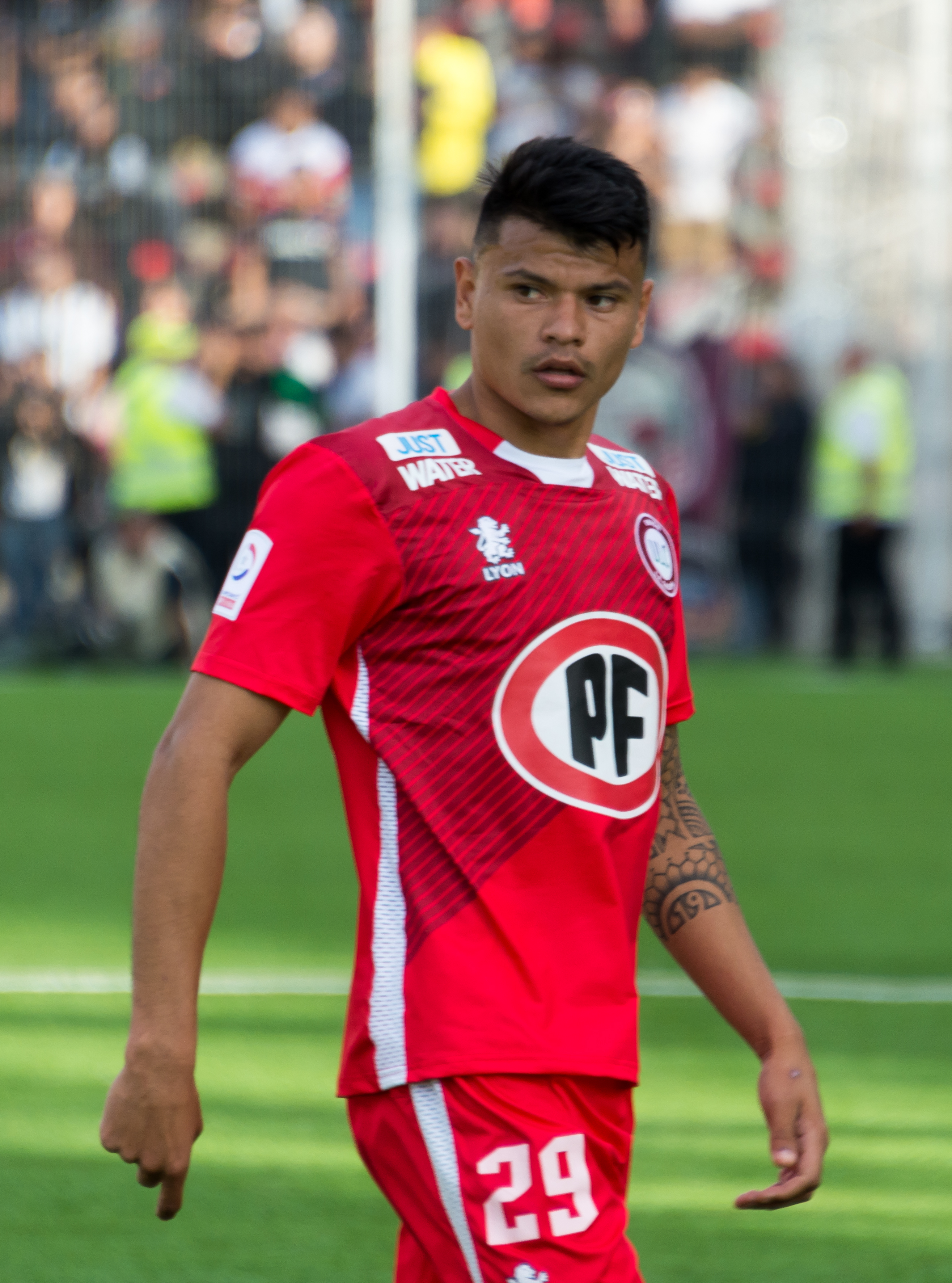 Walter Bou, Unión La Calera v Colo-Colo, Estadio Municipal Nicolás Chahúan Nazar, La Calera, Región de Valparaíso, Chile.